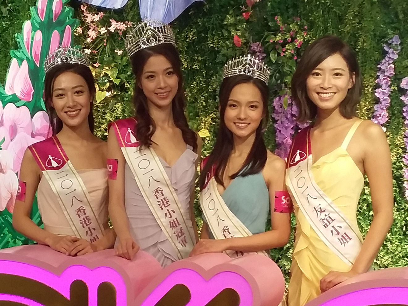 左起：2018年度香港小姐季軍丁子田、冠軍陳曉華、亞軍鄧卓殷、友誼小姐陳靜堯於2018年8月29日出席化妝品贊助商的頒獎儀式